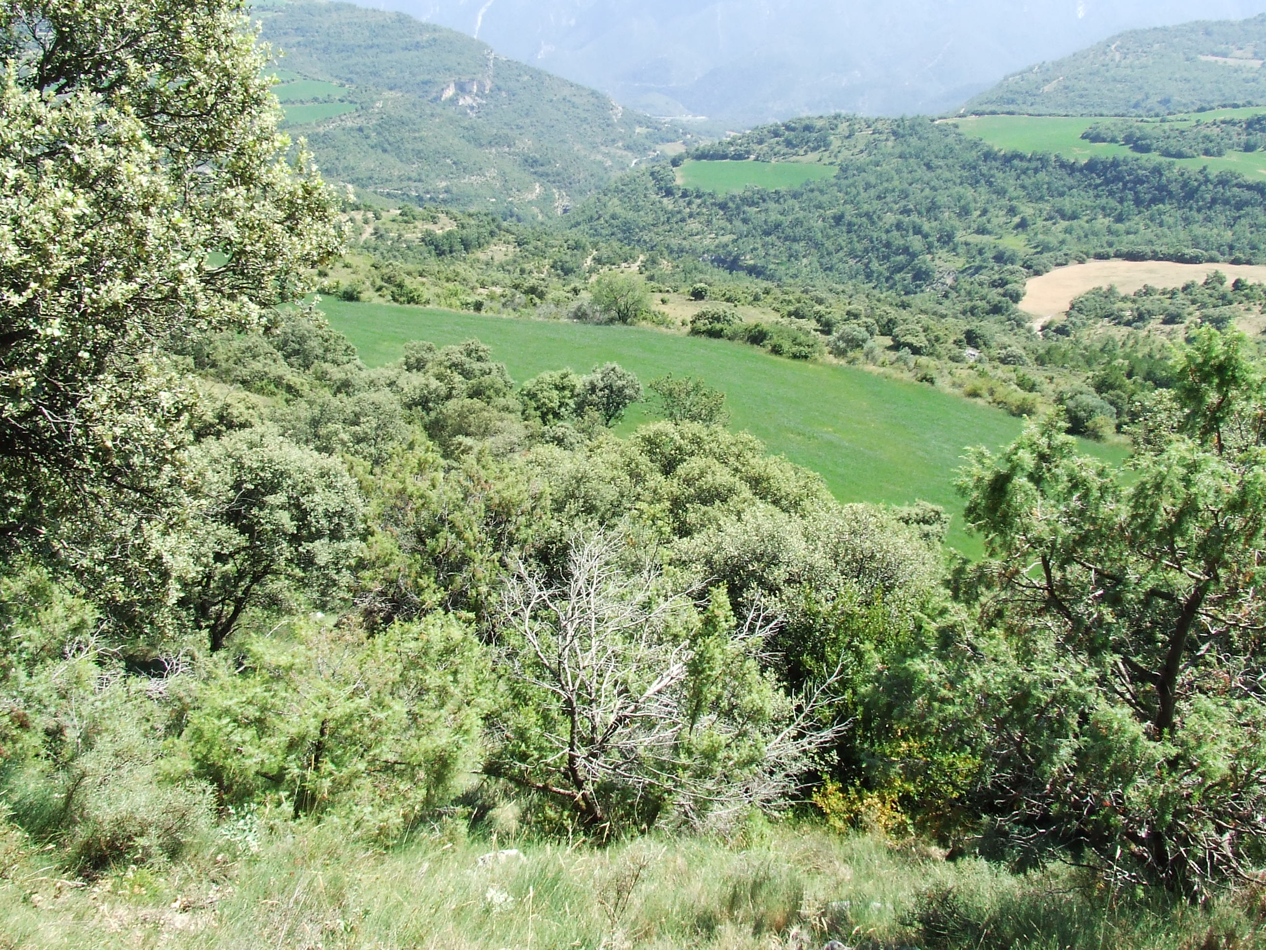 El Tros de Sellamana (el Meüll, Mur, Castell de Mur, Pallars Jussà)